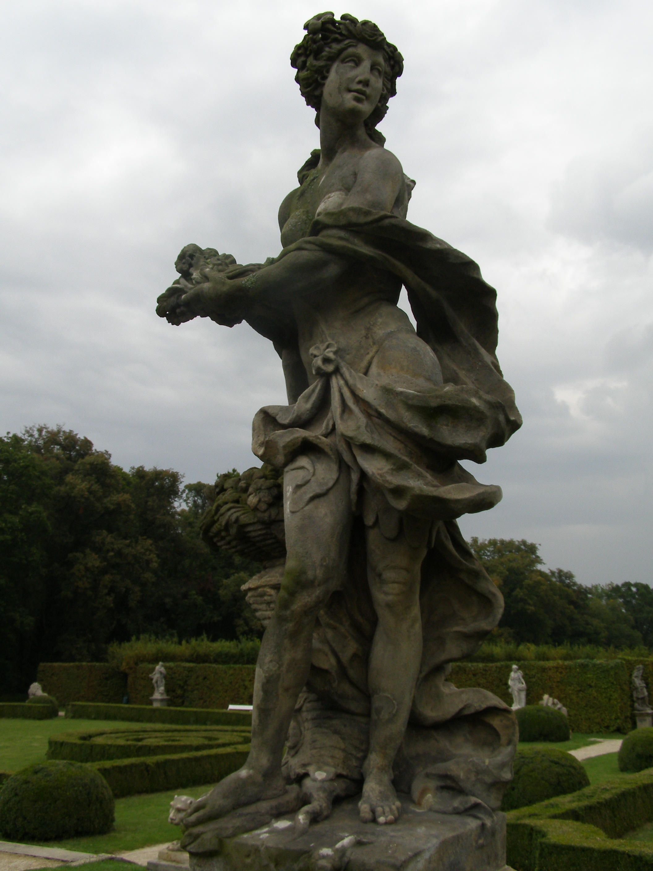 Zámek Lysá nad Labem, Zámecká 1/21, Lysá nad Labem